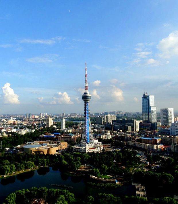 长春20160823吉塔景色